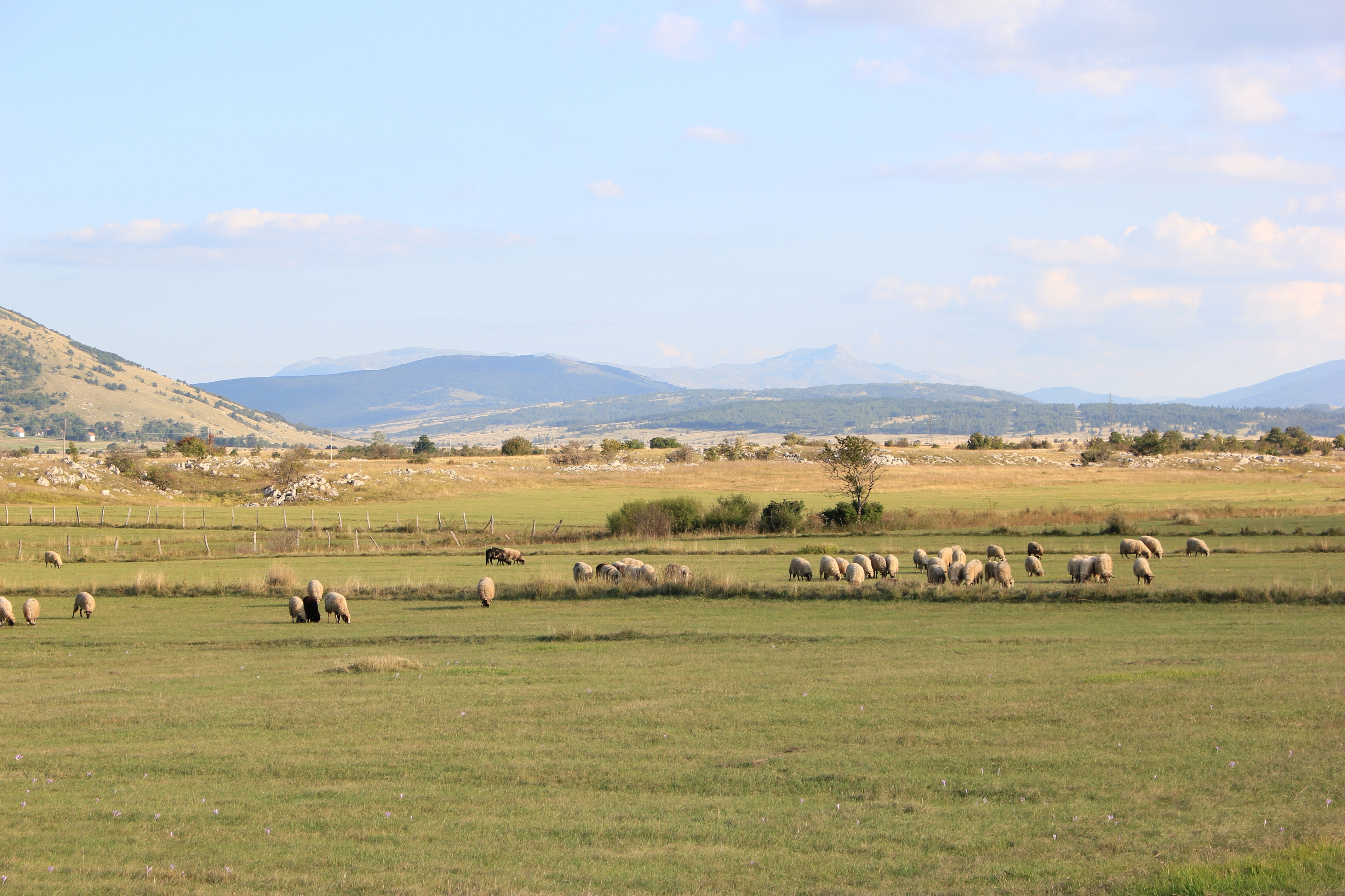 Im Grahovsko polje bei Bosansko Grahovo, Bosnien.